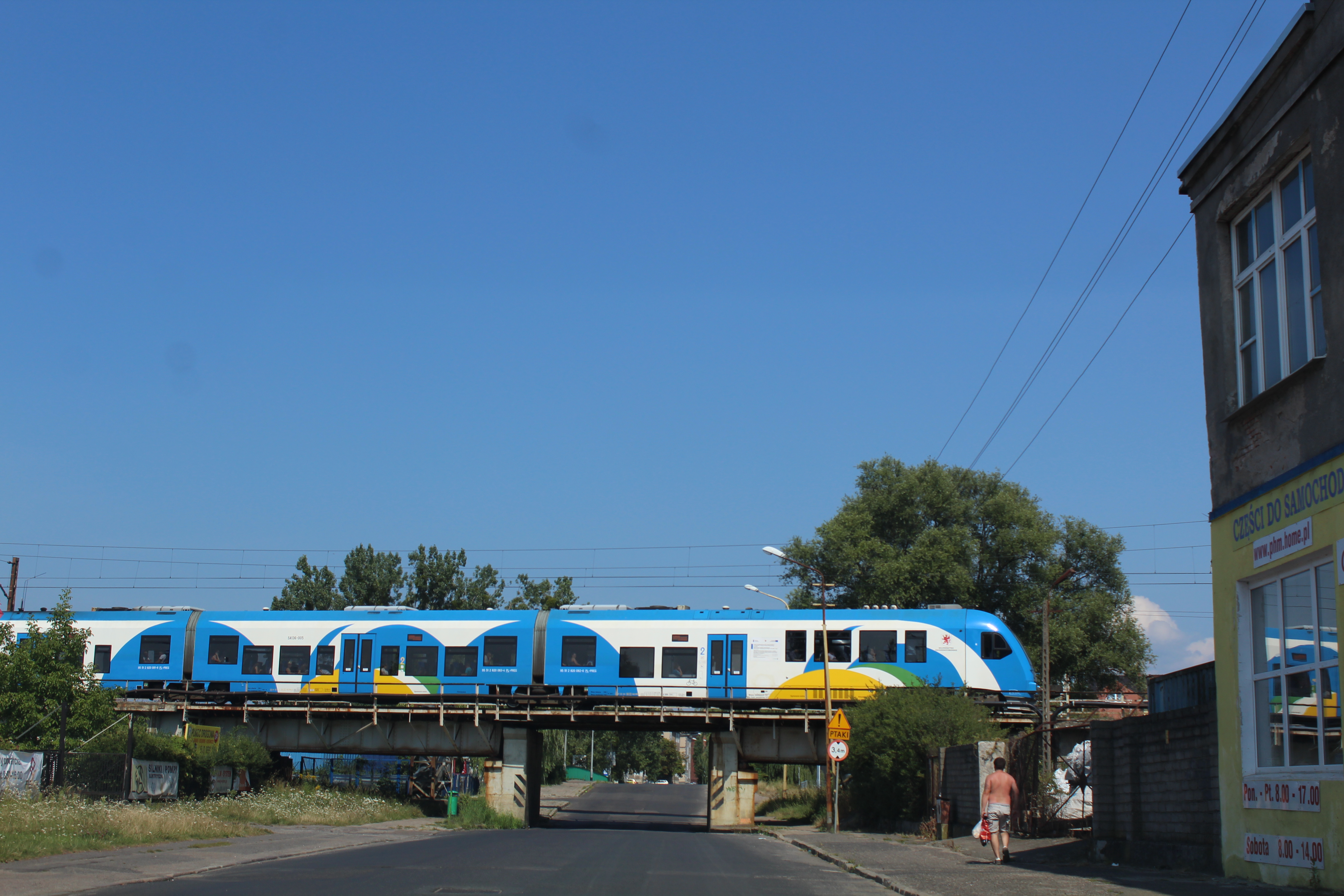 Wiadukt kolejowy, ul. Heyki, Szczecin